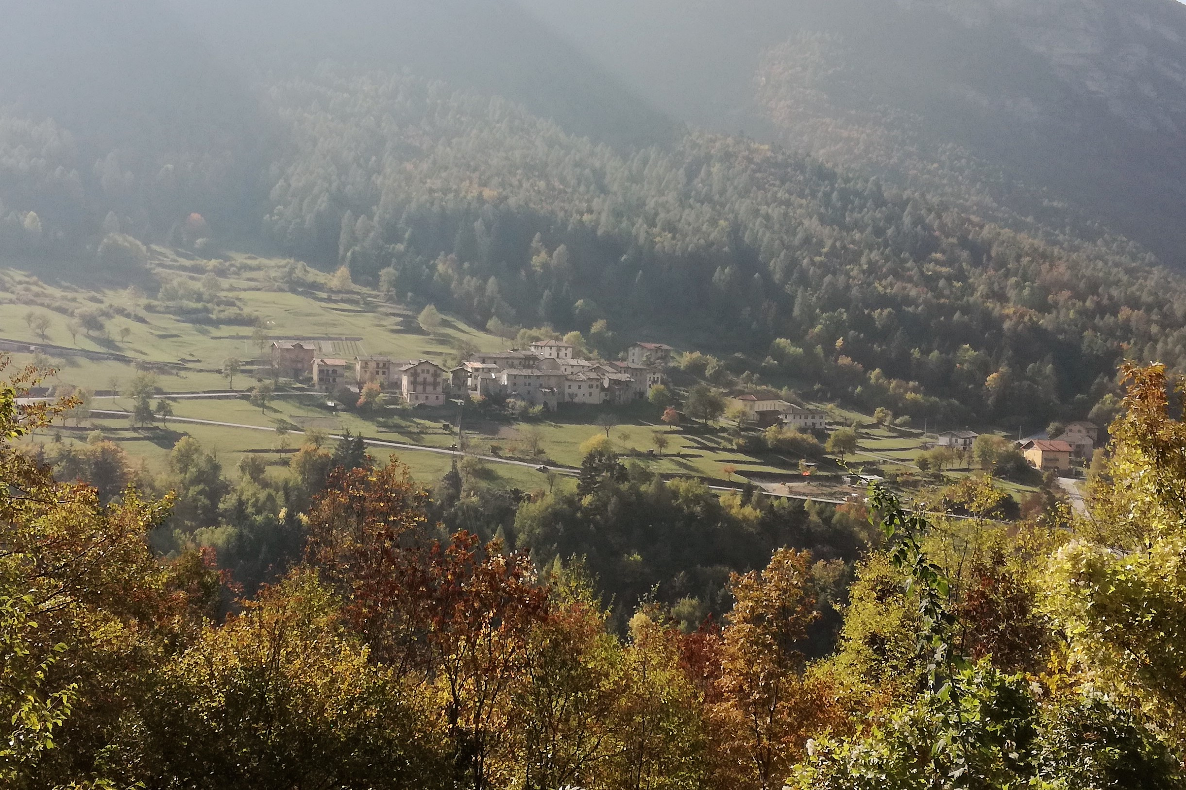 Geroli